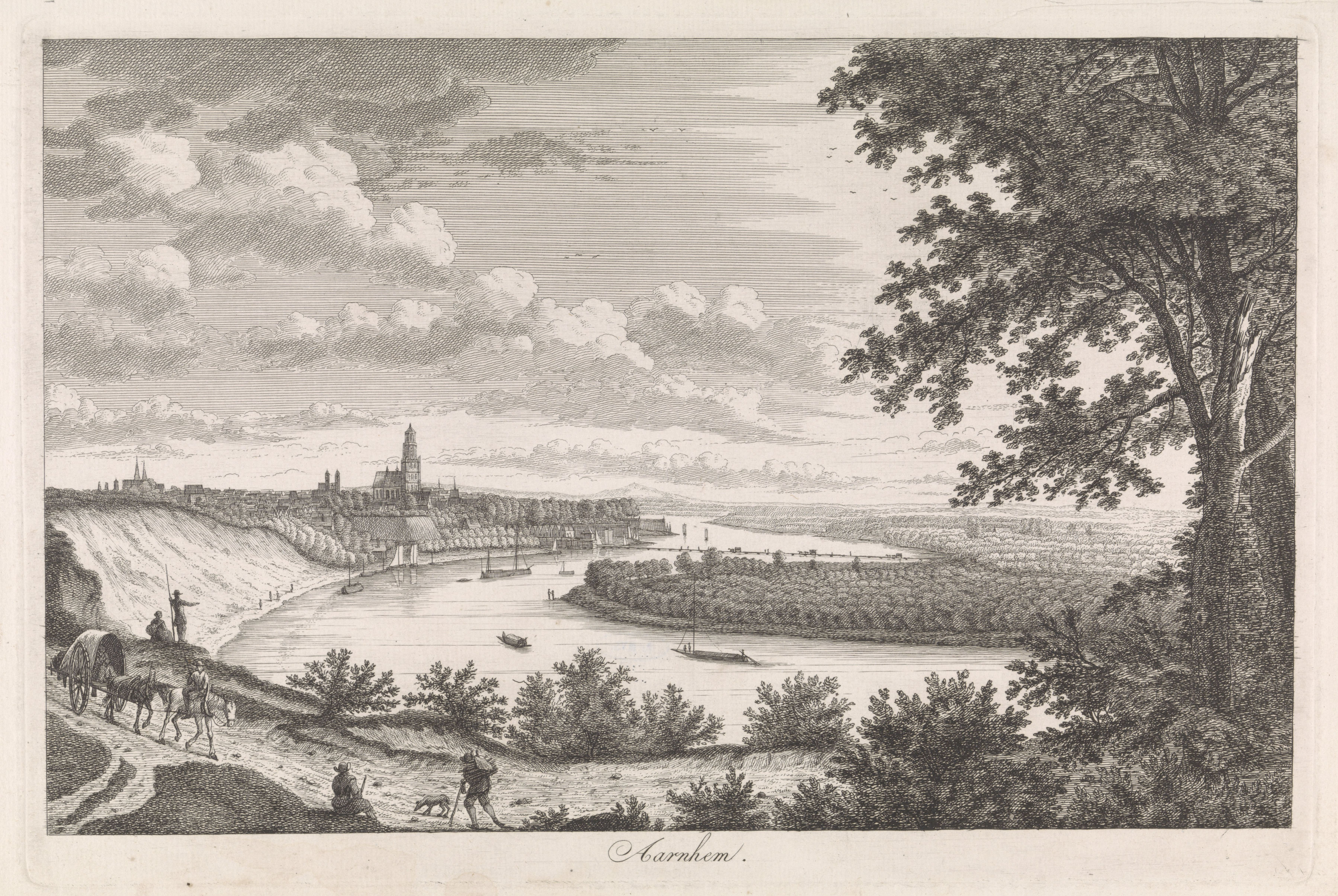 IdentificatieTitel(s): Gezicht op de Rijn bij ArnhemAarnhem (titel op object)Gezichten langs den Rhyn (serietitel)Objecttype: prent Objectnummer: RP-P-1904-2400Opschriften / Merken: verzamelaarsmerk, verso, gestempeld: Lugt 2228Omschrijving: Gezicht op de Rijn bij de stad Arnhem. De prent maakt deel uit van een elfdelige serie prenten met gezichten langs de Rijn.VervaardigingVervaardiger: prentmaker: Hendrik de Lethnaar tekening van: Cornelis Ploos van Amsteluitgever: Frederik Willem GreebePlaats vervaardiging: AmsterdamDatering: 1767Fysieke kenmerken: etsMateriaal: papier Techniek: etsenAfmetingen: plaatrand: h 227 mm × b 341 mmOnderwerpWat: riverships (in general)prospect of city, town panorama, silhouette of cityWaar: RijnArnhemVerwerving en rechtenVerwerving: aankoop 15-jul-1904Copyright: Publiek domein